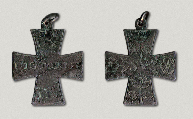 Orden der Crux Victorialis um ~1600